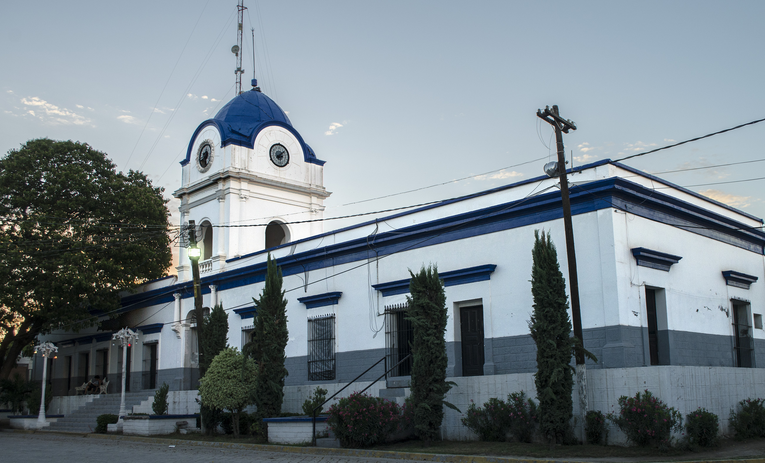 Sindicatura Municipal de Ahome